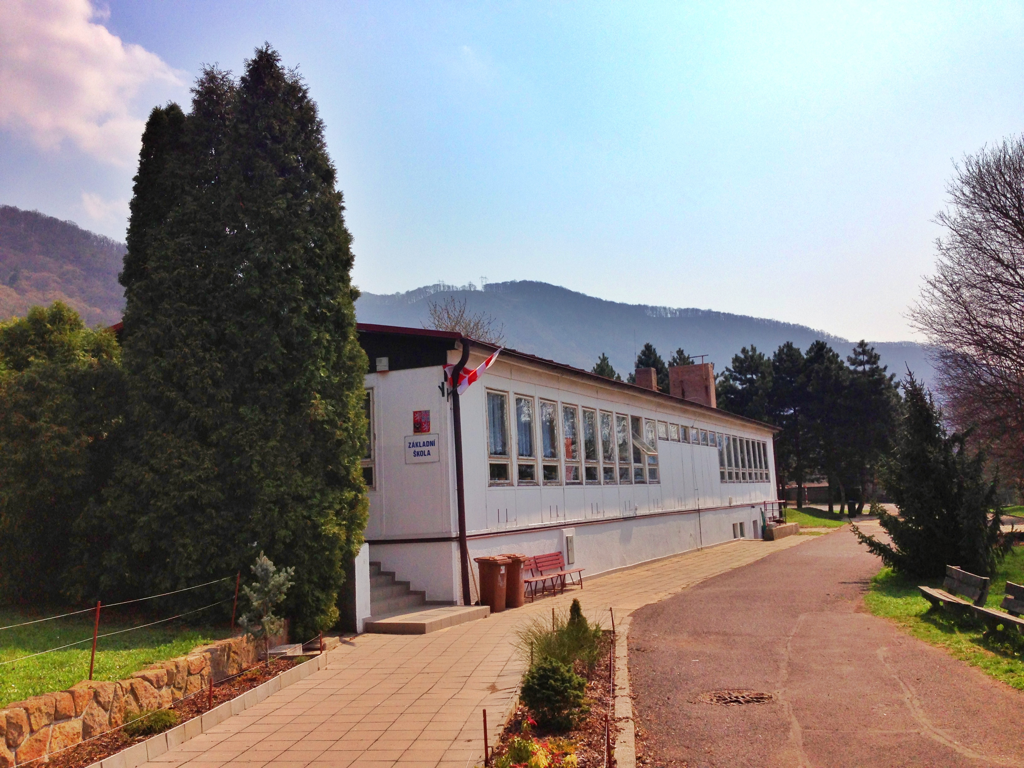 Základní škola v Jitřní ulici v Brné nad Labem, která je součástí Ústí nad Labem v České republice.